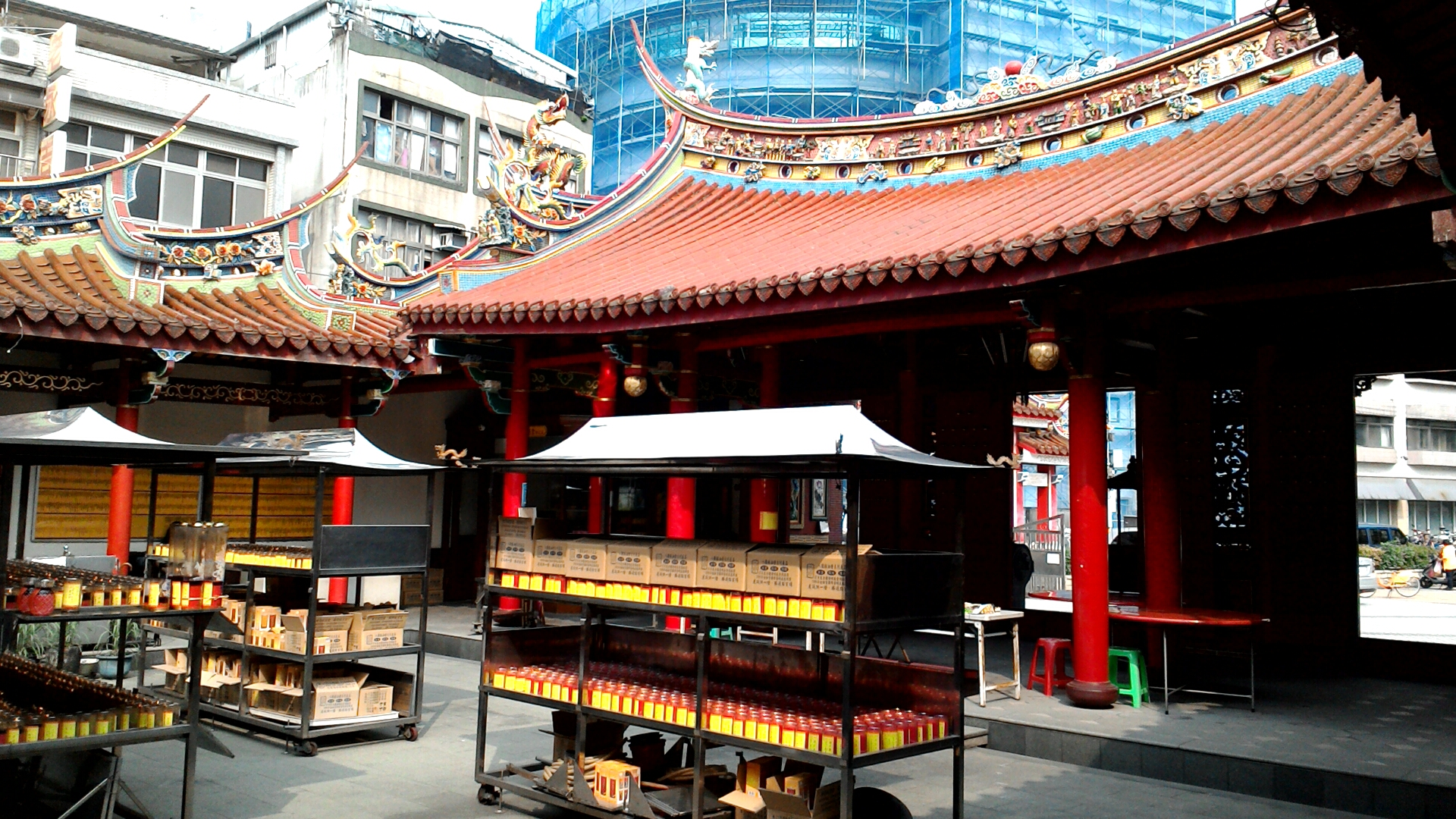 桃園文昌宮光明燈,桃園市桃園區市中次分區文昌里